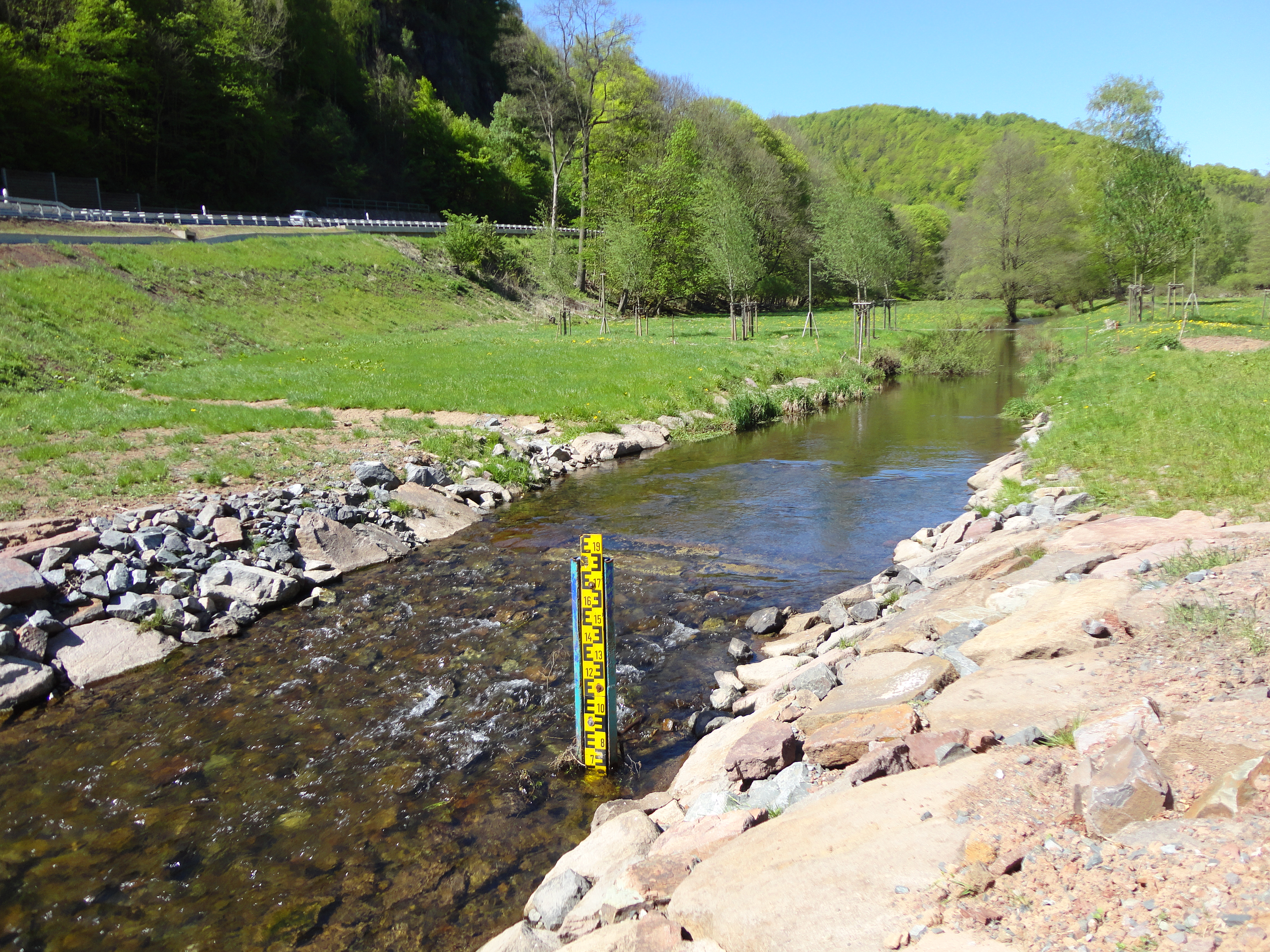 Die Bere an der neuen Pegelmessstation.